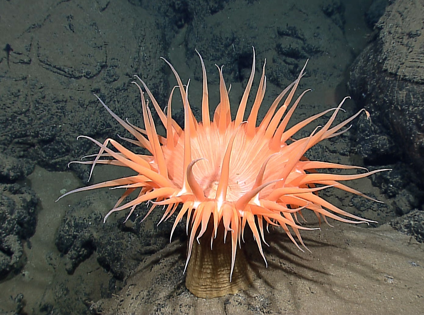 Imagen de Actinostola sp mostrando su columna